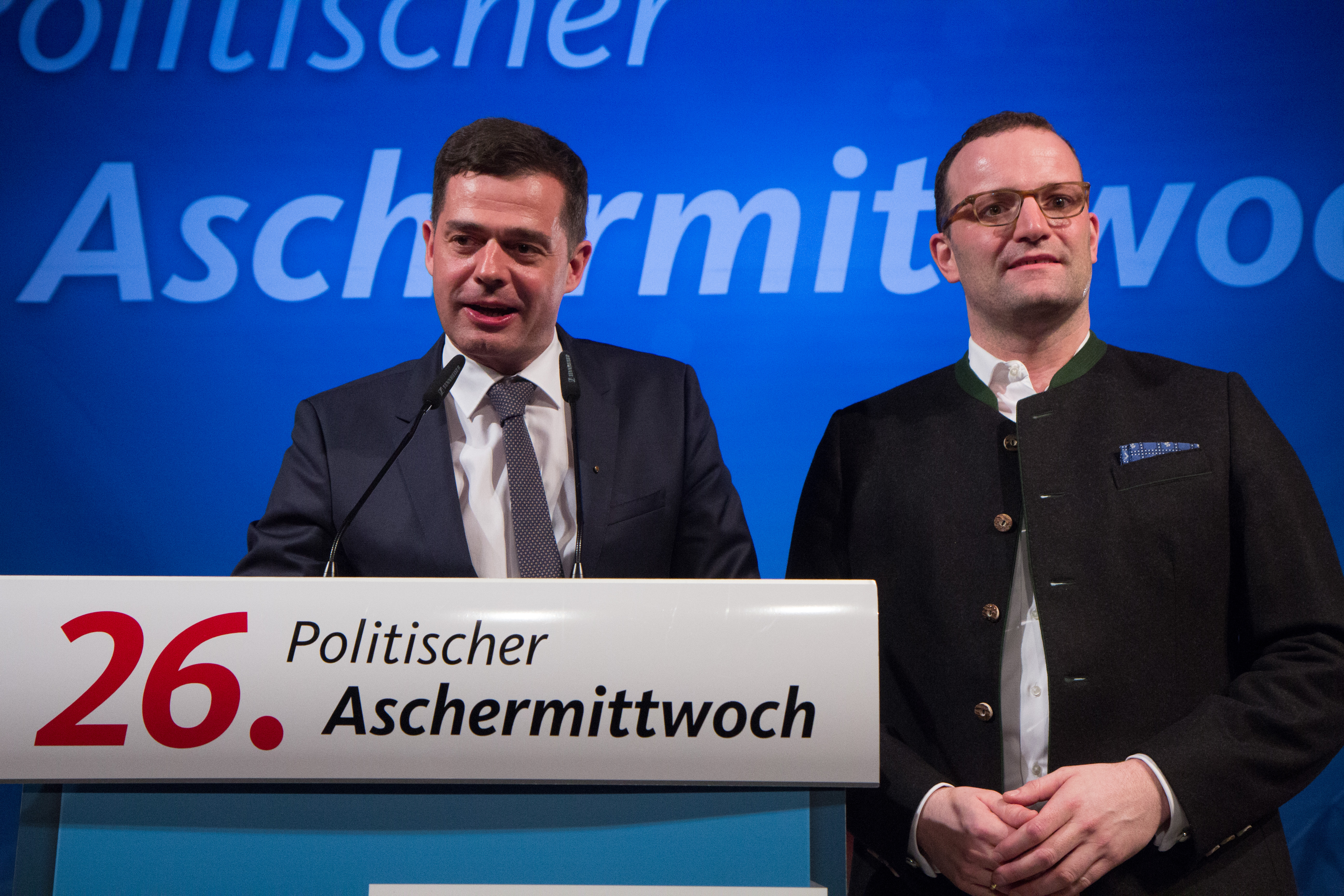 Politischer Aschermittwoch der CDU Thüringen am 14. Februar 2018 in Apolda.